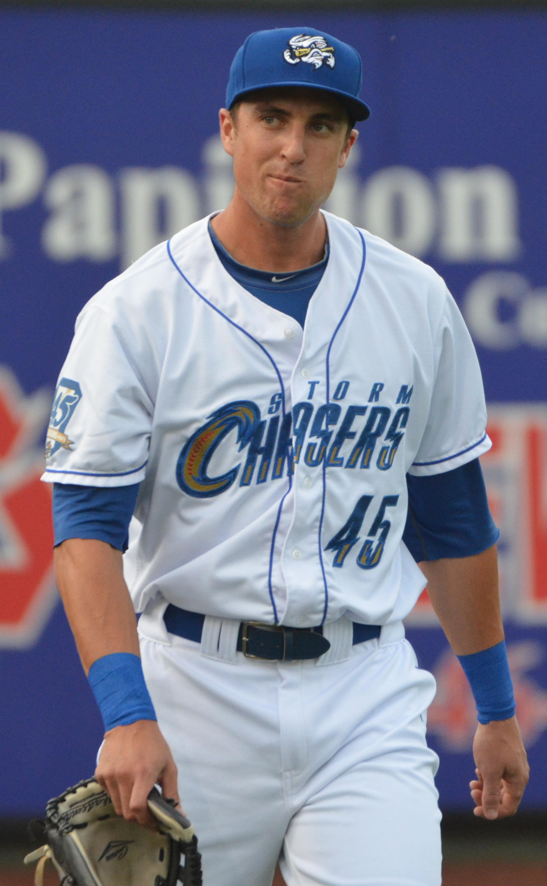 Lane Adams